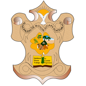 Escudo municipal de Moyuta